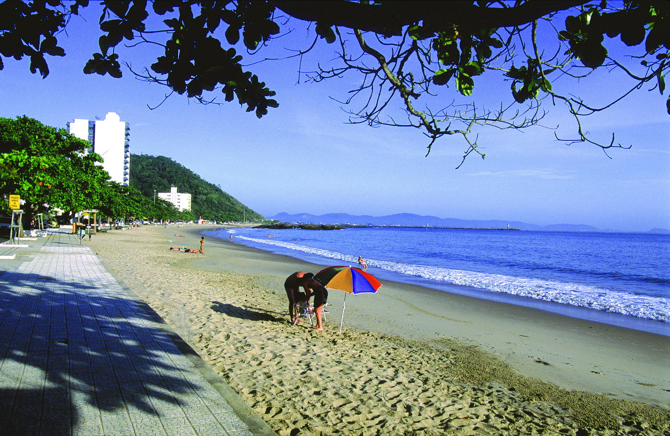 Praia de Cabeçudas